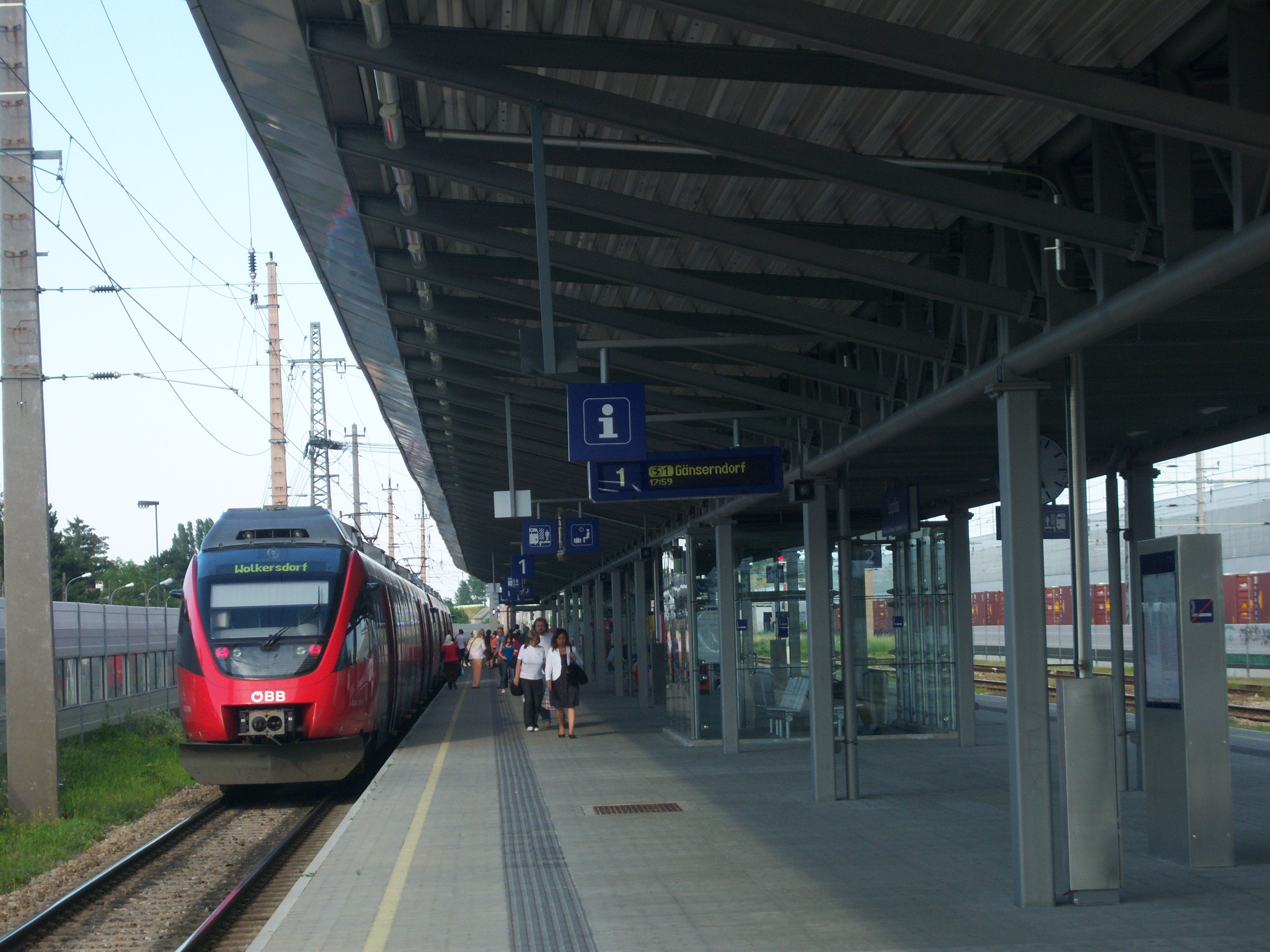 Bahnhof Wien Leopoldau